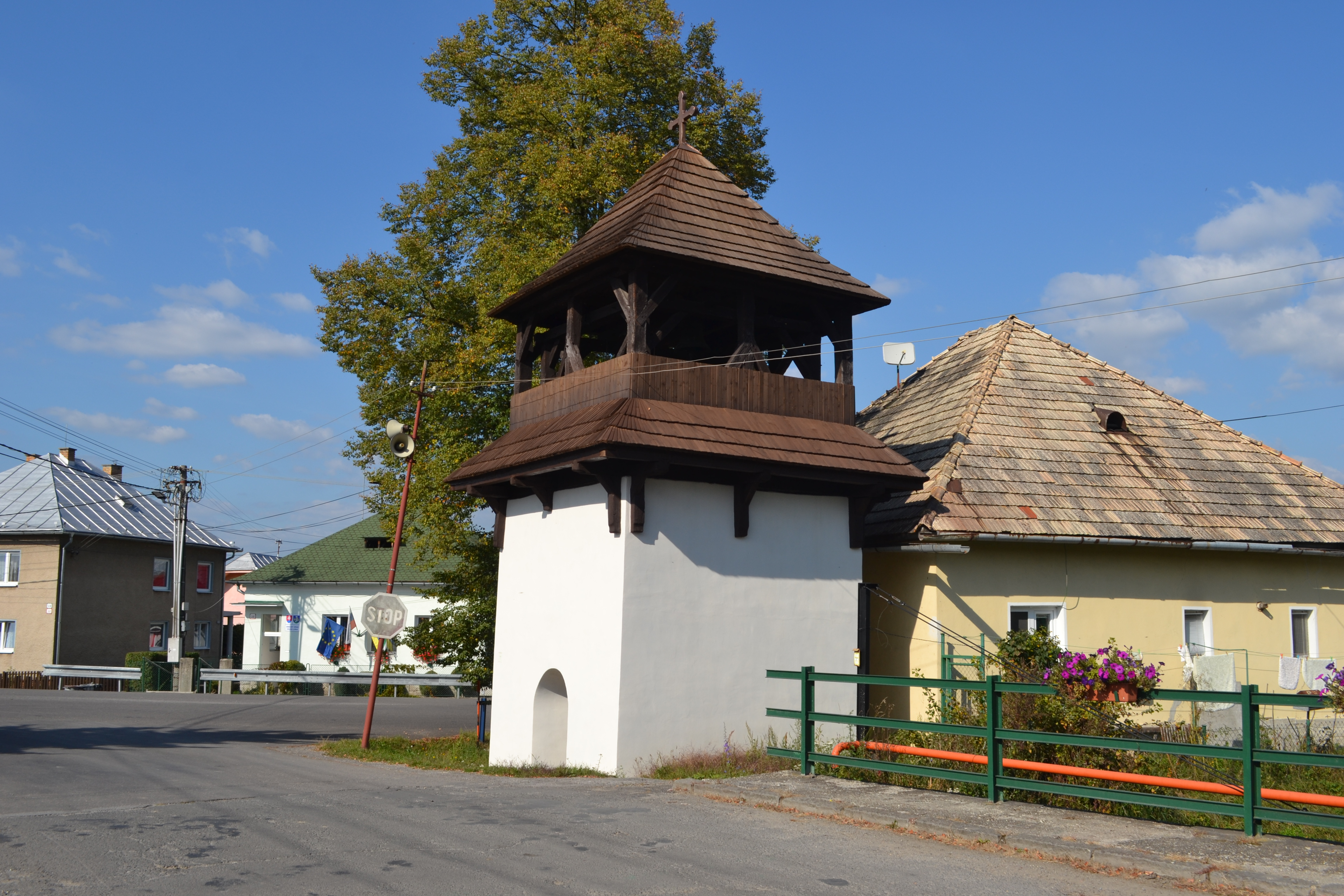 Zvonica vo Veľkej Lúke